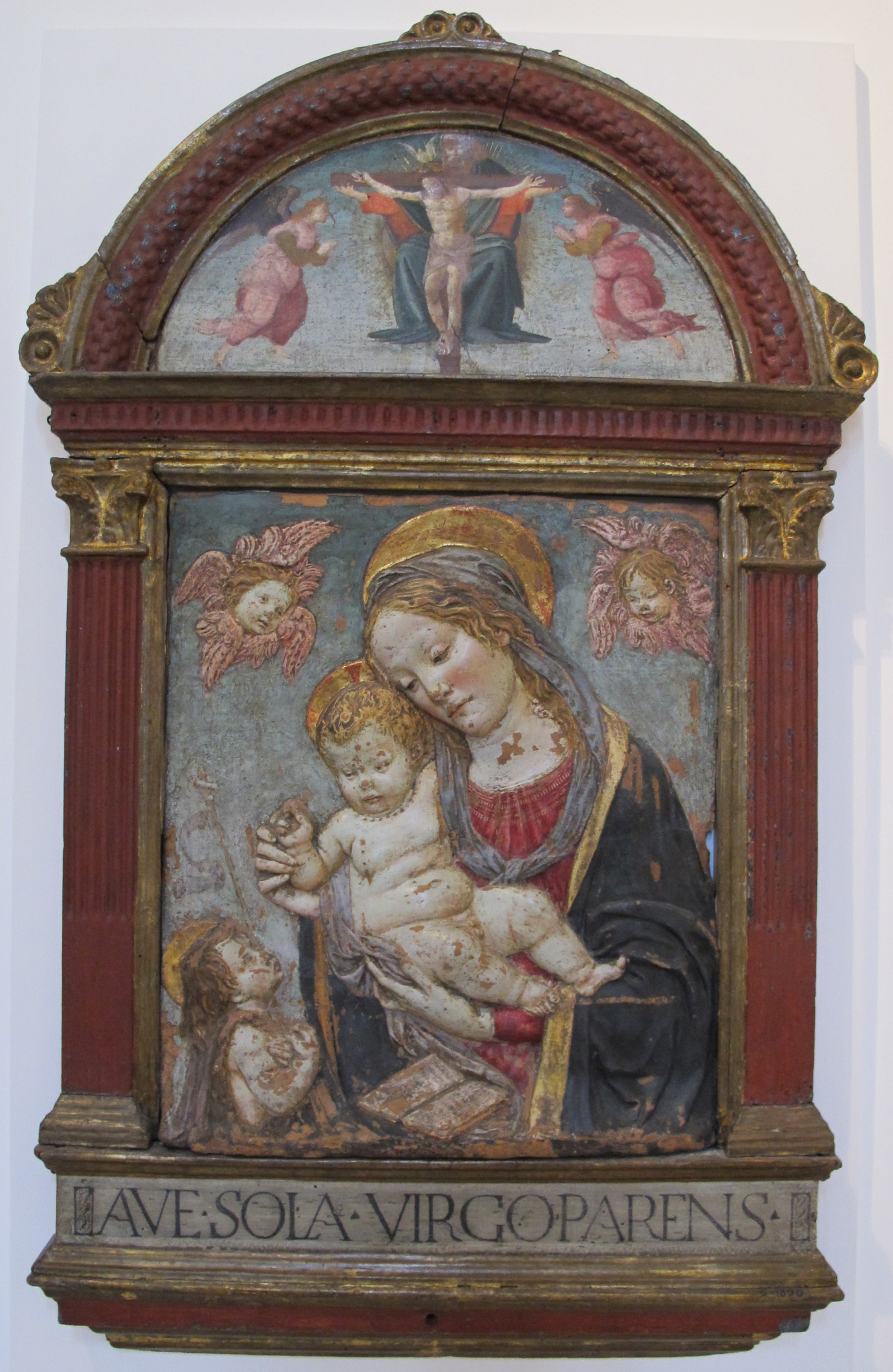 Da Benedetto da maiano, madonna col bambino e san giovannino, 1475-1500 ca.